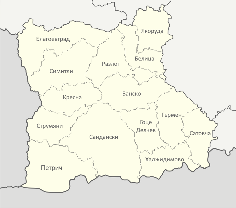 Картата е създадена от Любомир Таушанов